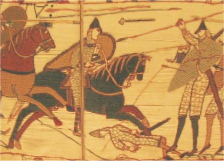 Broderie de Bayeux (détail)